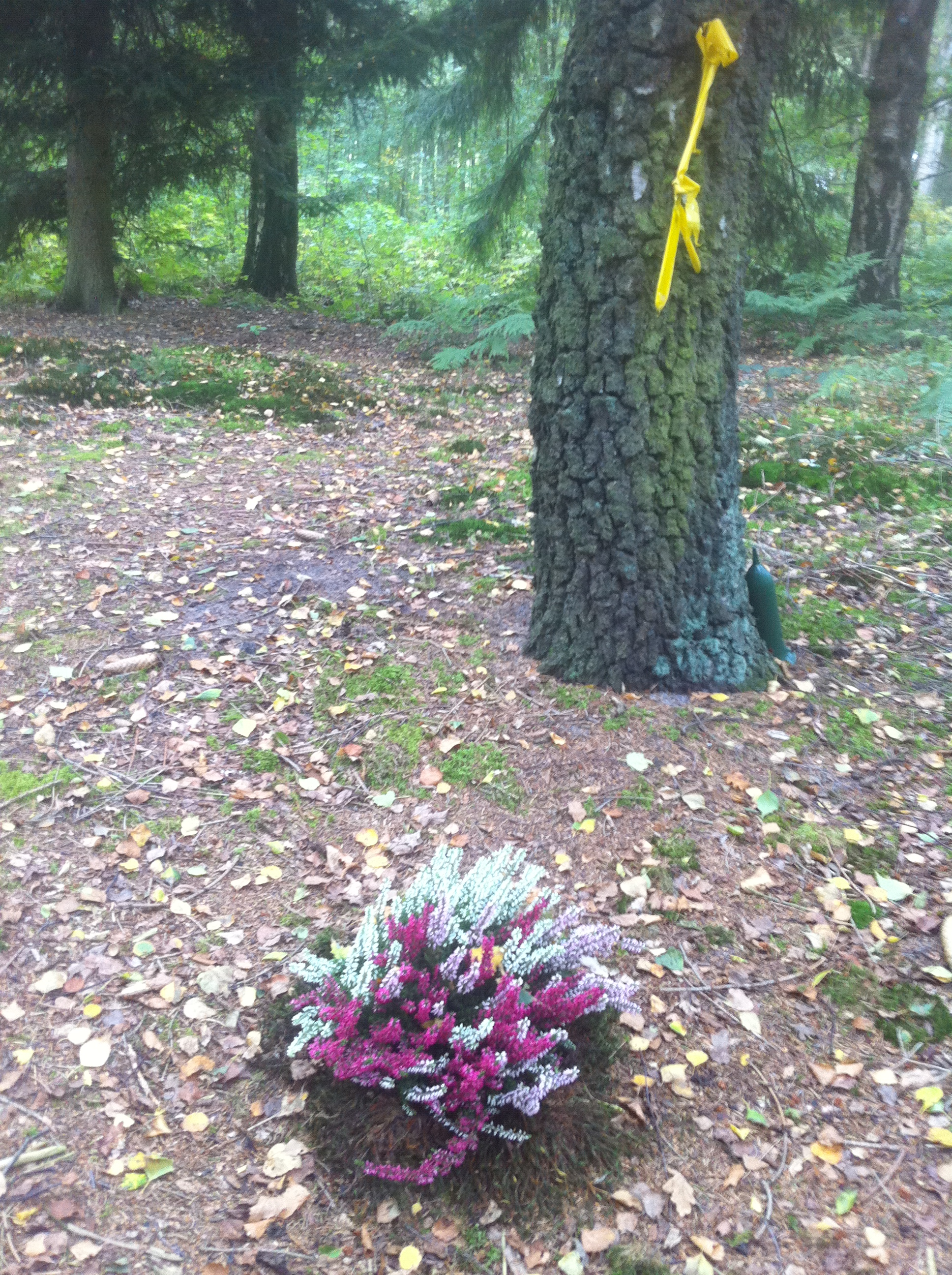 Grabbepflanzung im Urnenwald Bönningstedt